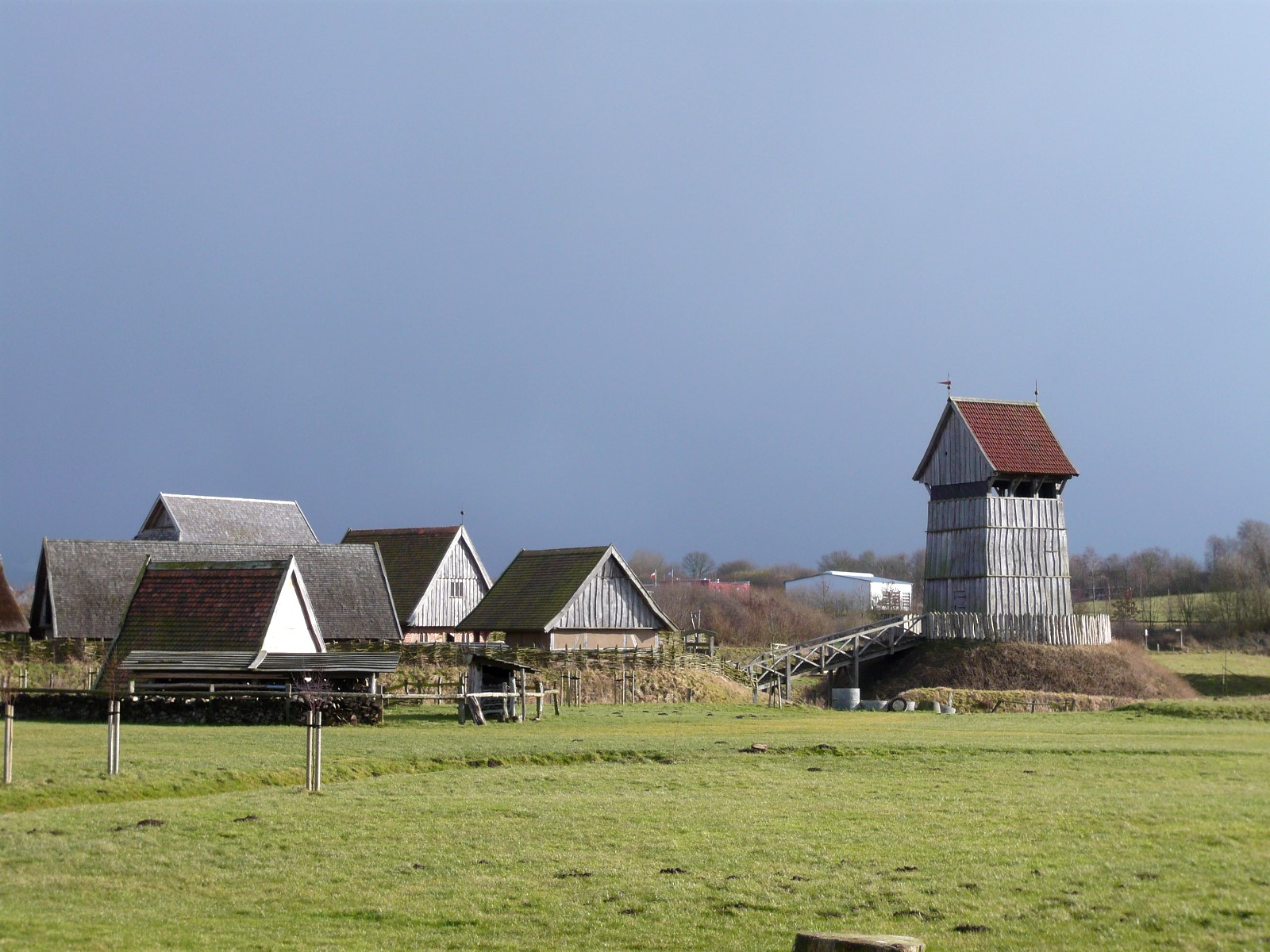 Rekonstruktion einer Turmhügelburg im Nienthal von Lütjenburg.